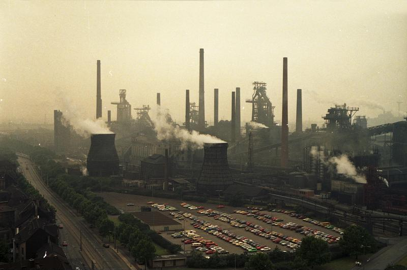 Juni 1988 Duisburg: Thyssen-Stahlwerk mit Hafen.